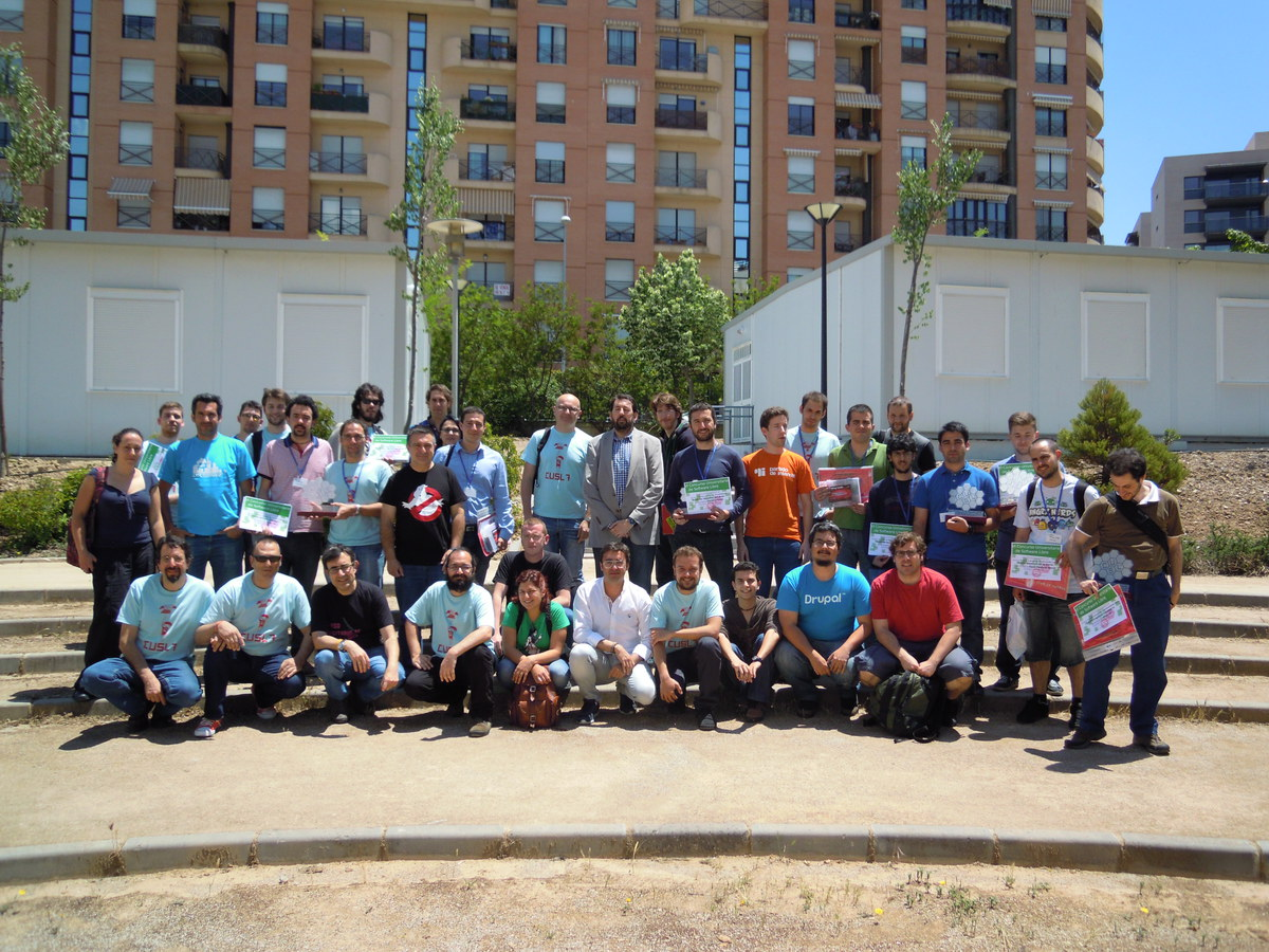 Equipo del VII Certamen